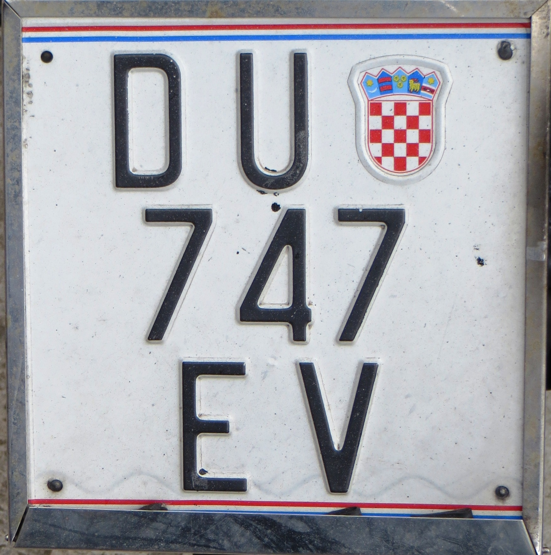 Motorfiets kentekenplaat Kroatië